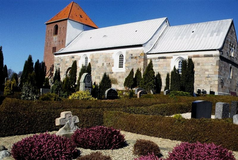 Vinderslev Kirke, Silkeborg Kommune, set fra sydøst